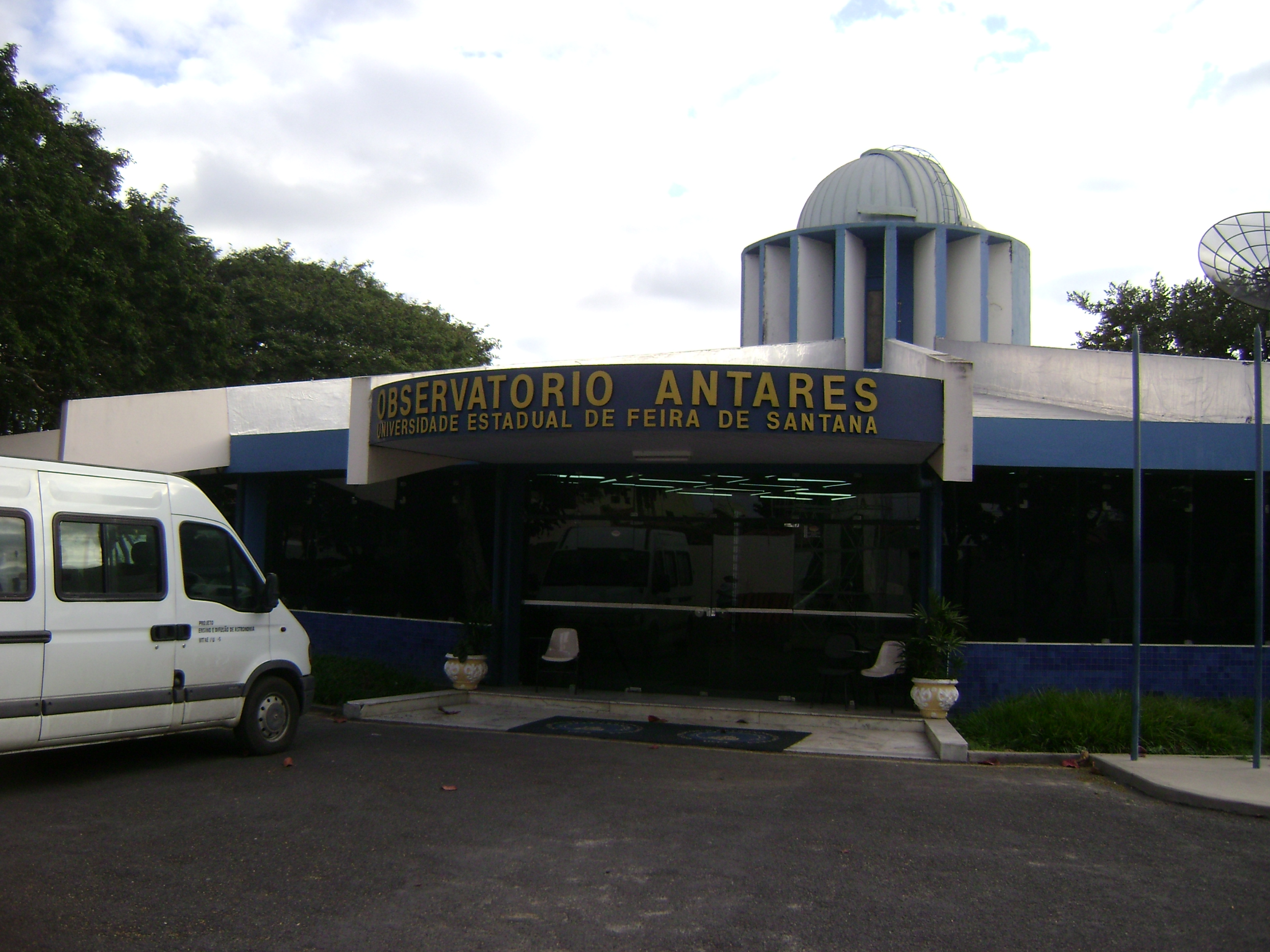 Entrada do Observatório Antares, em Feira de Santana, Brasil.